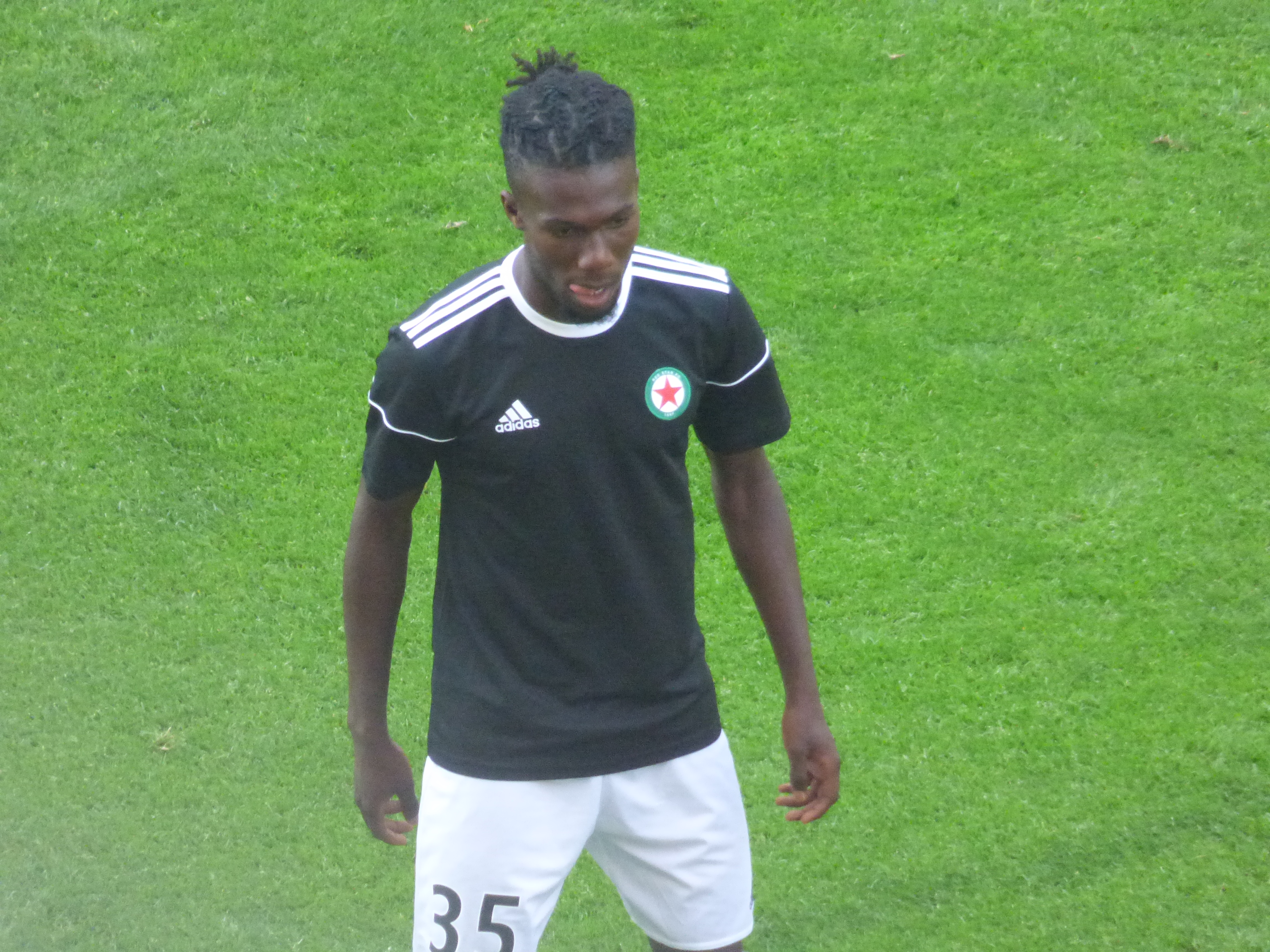 Ismaël Camara avant le match RC Lens / Red Star, comptant pour la deuxième journée du championnat de France de Ligue 2 2018-2019 au Stade Bollaert-Delelis, le 4 août 2018.